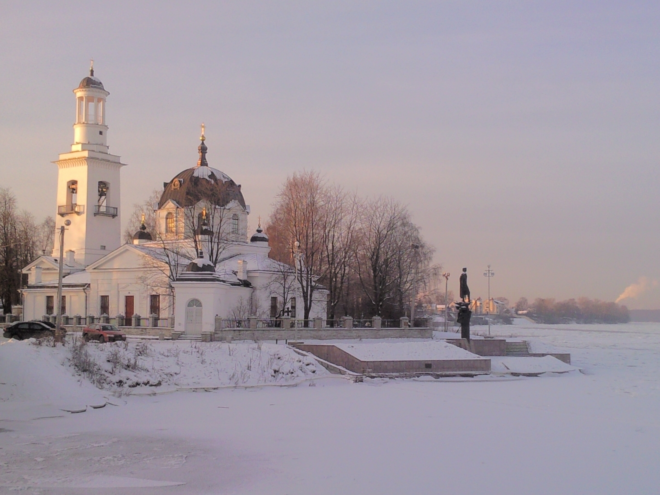 Памятник св.равноапостольному кн.А.Невскому на месте "Невской битвы" рядом с одноименным Собором..